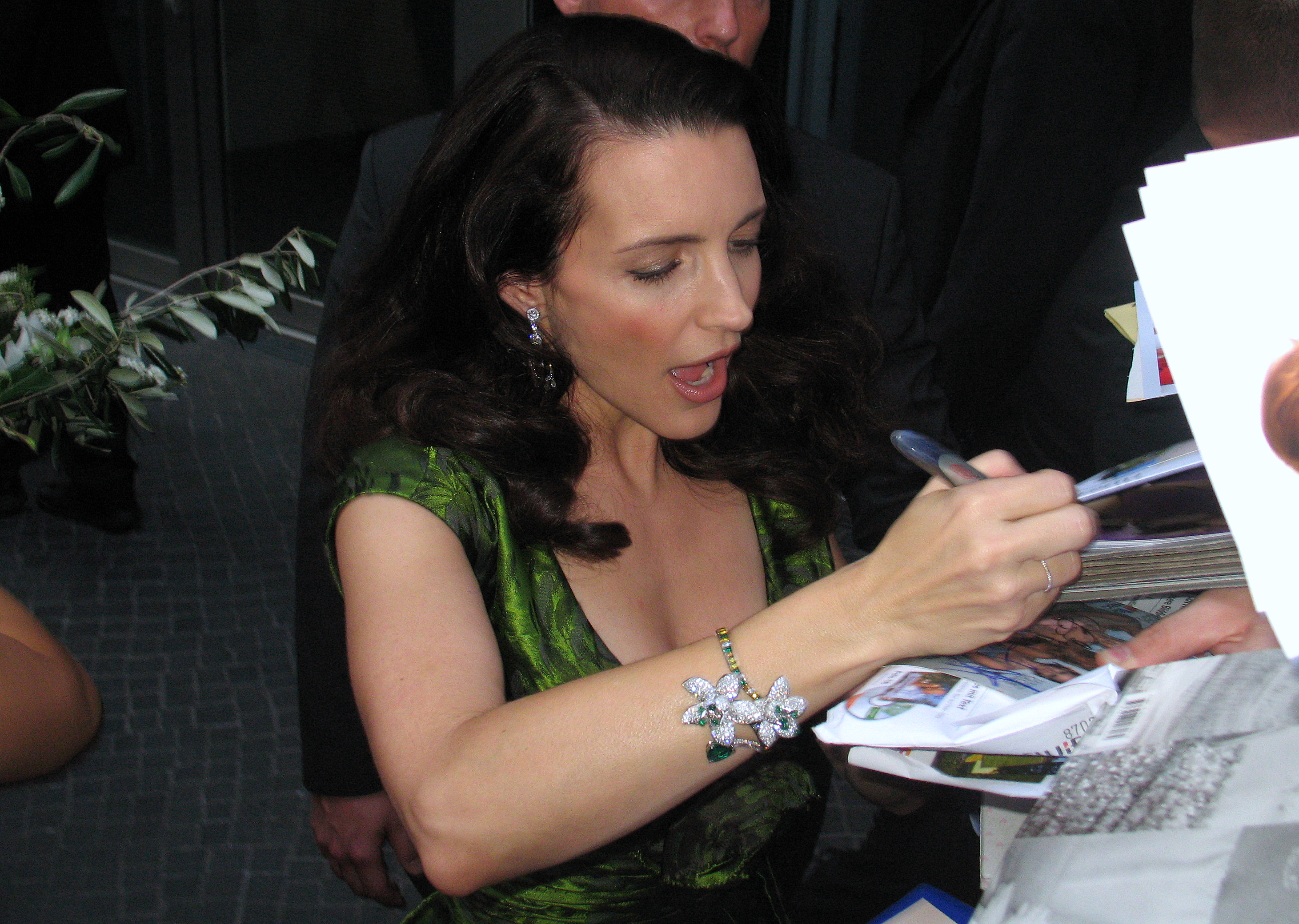 Kristin Davis bei der Premiere von Sex and The City Berlin, 15. Mai 2008